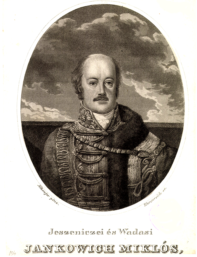 Vadasi és jeszeniczei Jankovich Miklós (Pest, 1772. január 2. – Pest, 1846. április 18.) könyv-, régiség- és műgyűjtő, történész, a Magyar Tudós Társaság tiszteleti tagja (1831). Kora legértékesebb magánkönyvtárának, levéltári és régiséggyűjteményének tulajdonosa, az 1810-es–1830-as évek tudományos közéletének jeles alakja, szenvedélyes történetbúvár volt.